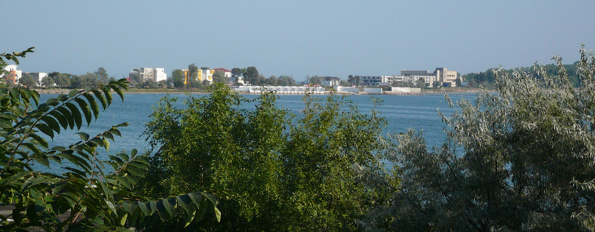 Salt Lake near Eforie Nord, Romania.